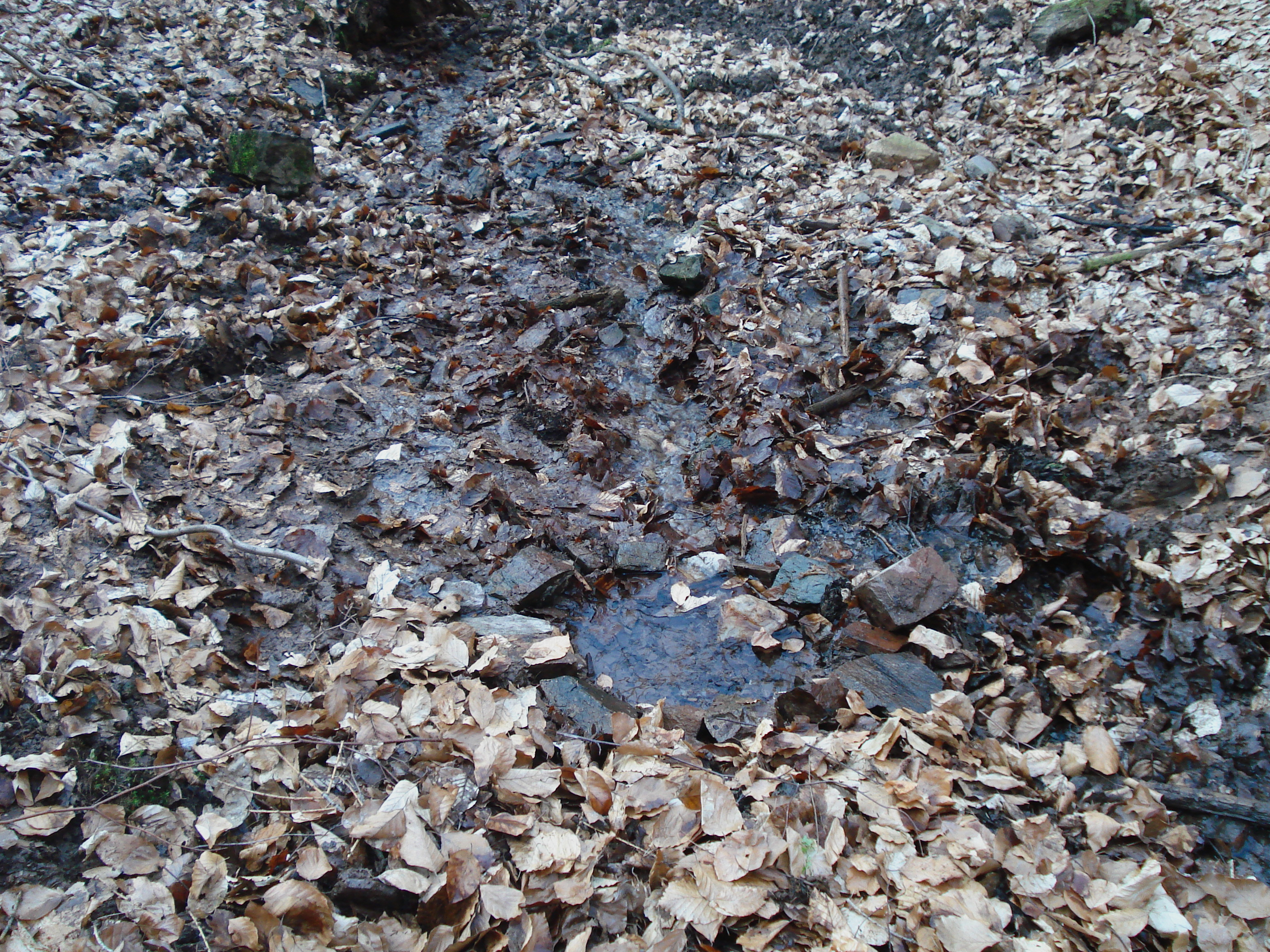 Der Engelsbrunnen (Ursprung des Rückersbaches)